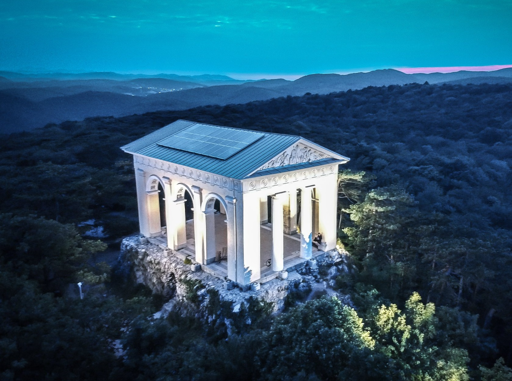 Husarentempel auf dem Kleinen Anninger im Gemeindegebiet von Mödling (Niederösterreich) im Juni 2018